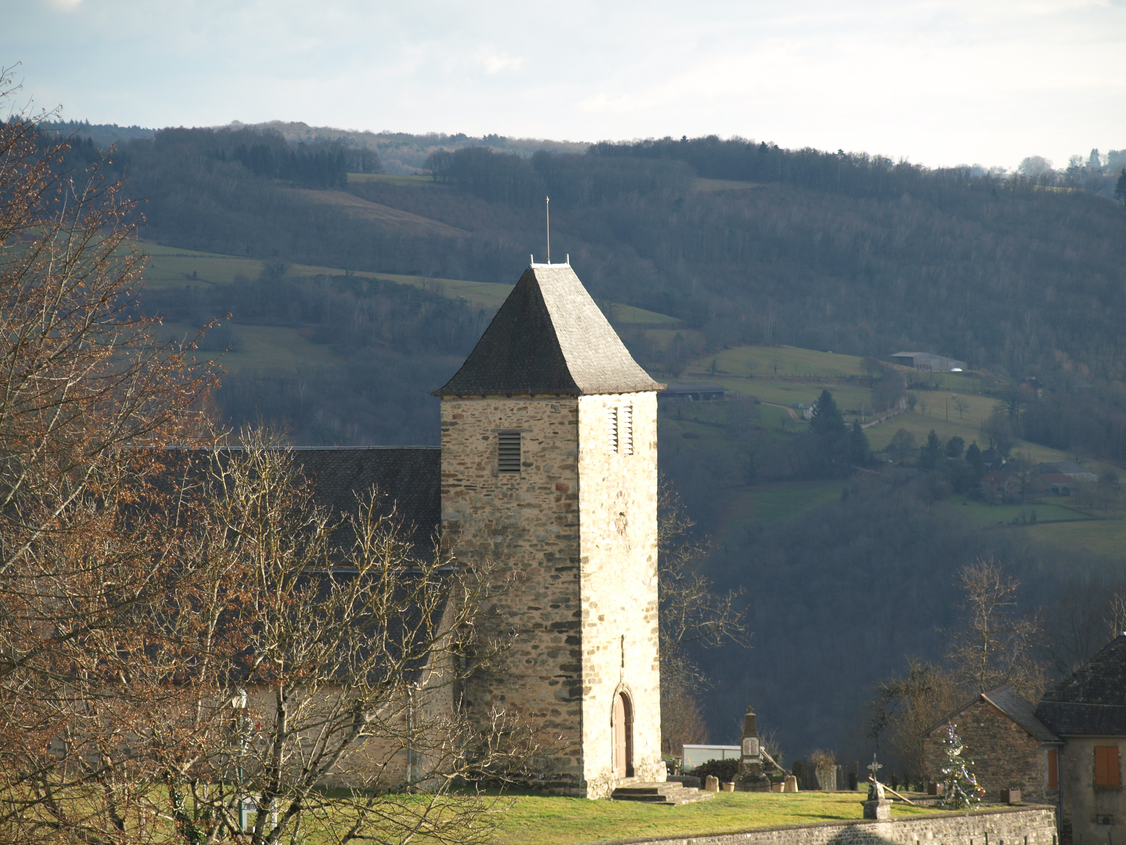 Vue de l'église de Chenailler